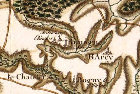 Rimogne (France) - Carte de Cassini, vers 1780